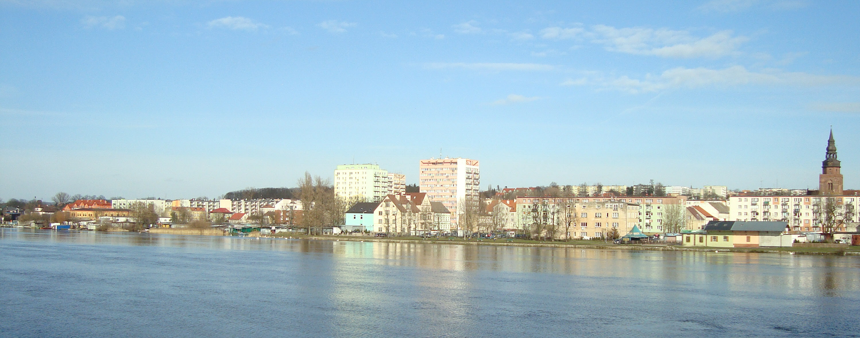 Widok z mostu od strony Międzyodrza na nadbrzeże Odry w Gryfinie.